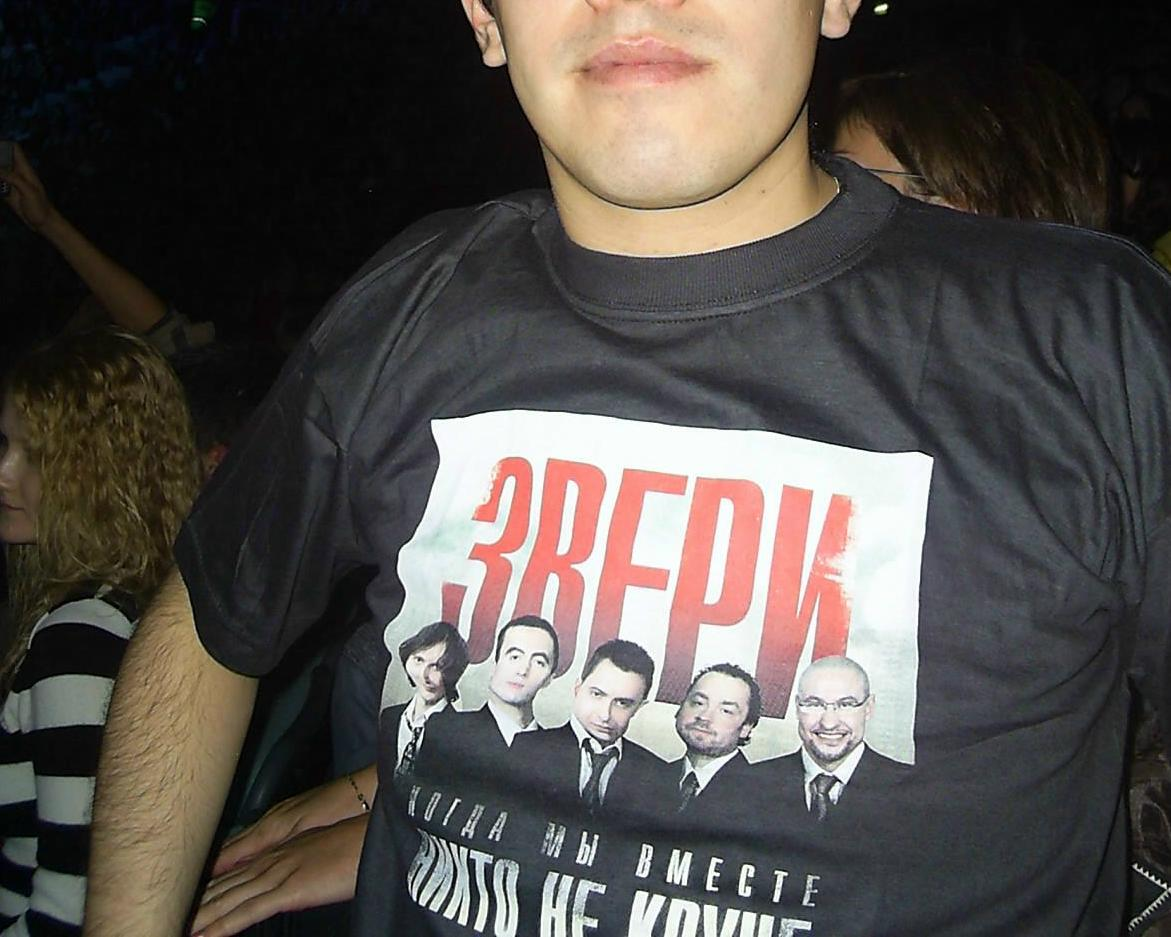 Fan de Zveri con camiseta con la foto del grupo